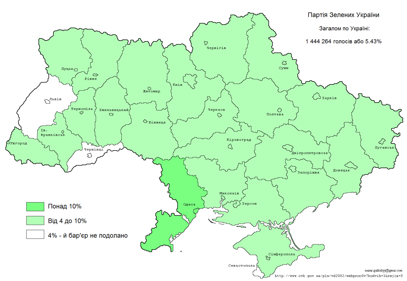 Рівень підтримки Партії Зеоених по областях